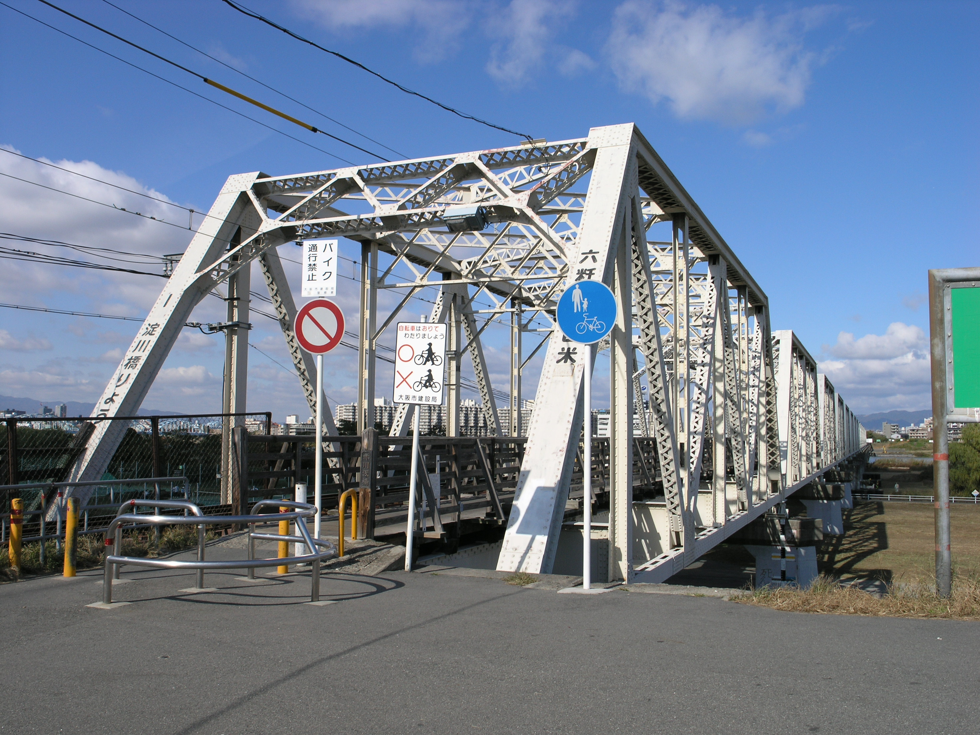 城東貨物線淀川橋梁（大阪市東淀川区-都島区） 2008年11月撮影。 機材：C8080WZ 撮影者：Kansai explorer